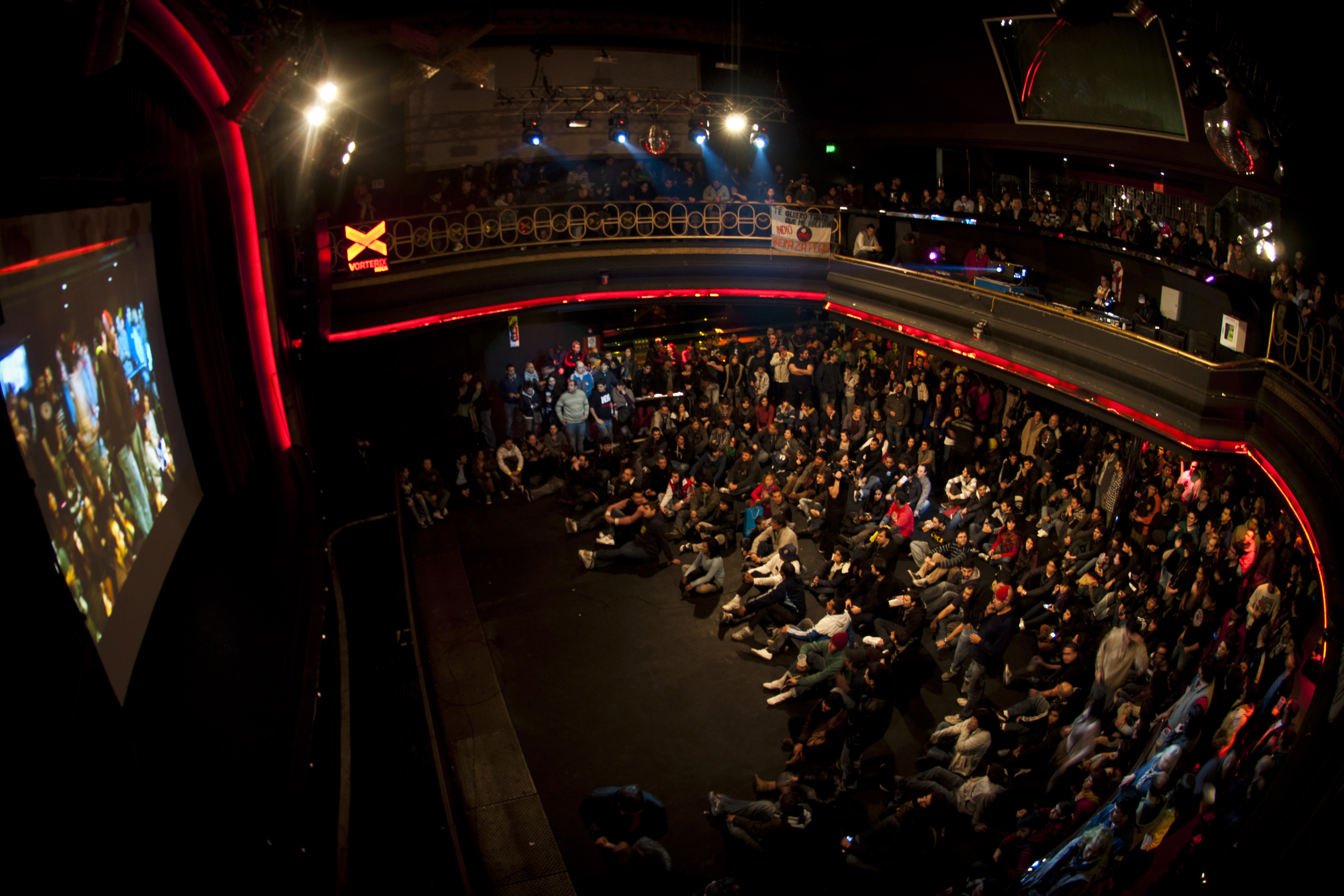 Presentación del video documental Piedra que late, sobre la Misa India celebrada en Tandil el 3 de diciembre de 2011. La presentación se realizó en el Teatro Vorterix el 9 de julio de 2013.